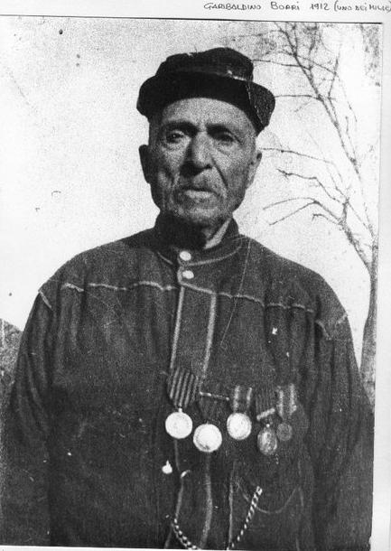 Uno dei Mille di Garibaldi